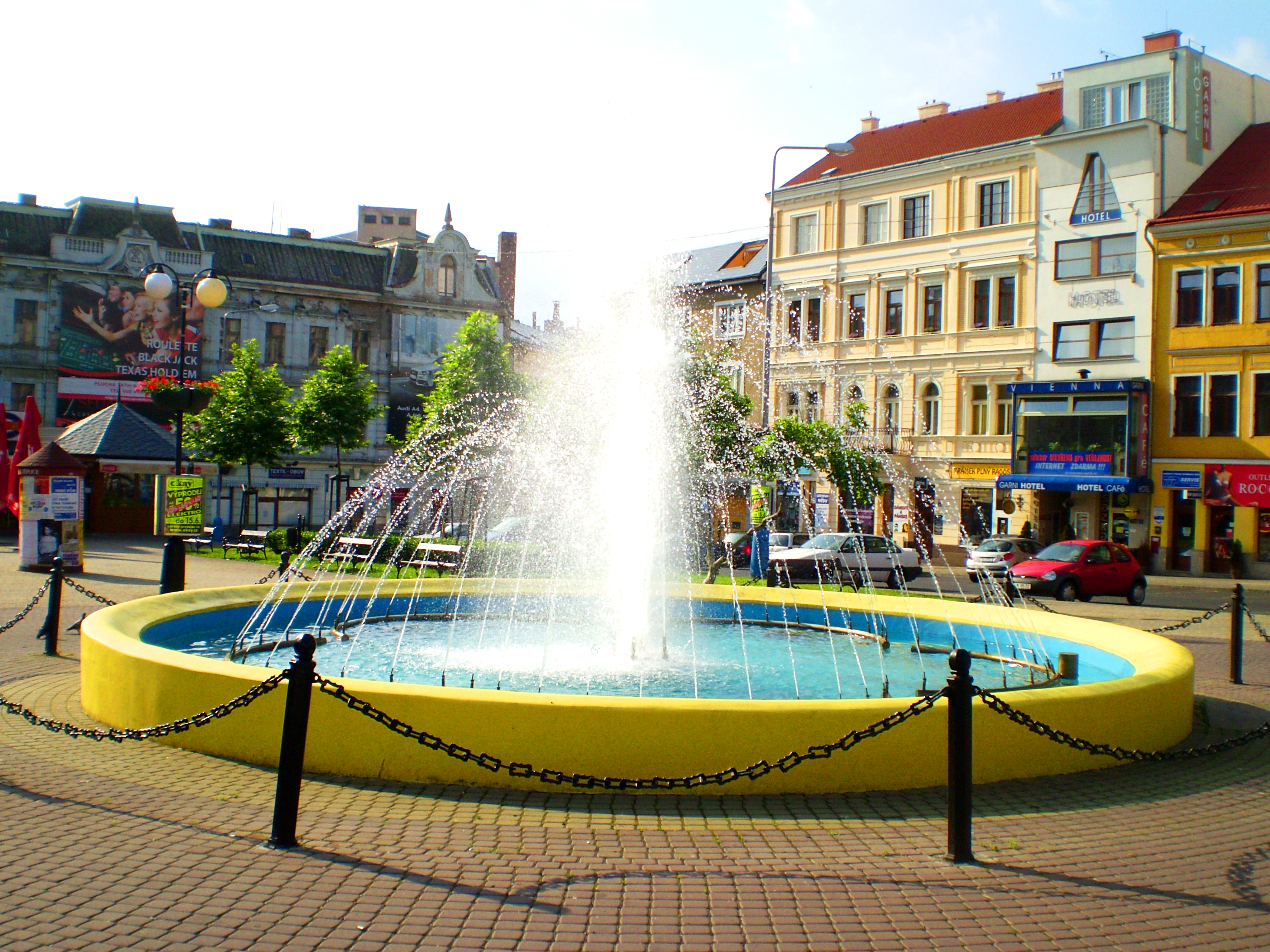 Kašna uprostřed Benešova náměstí v centru Teplic.